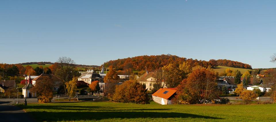 součastnost